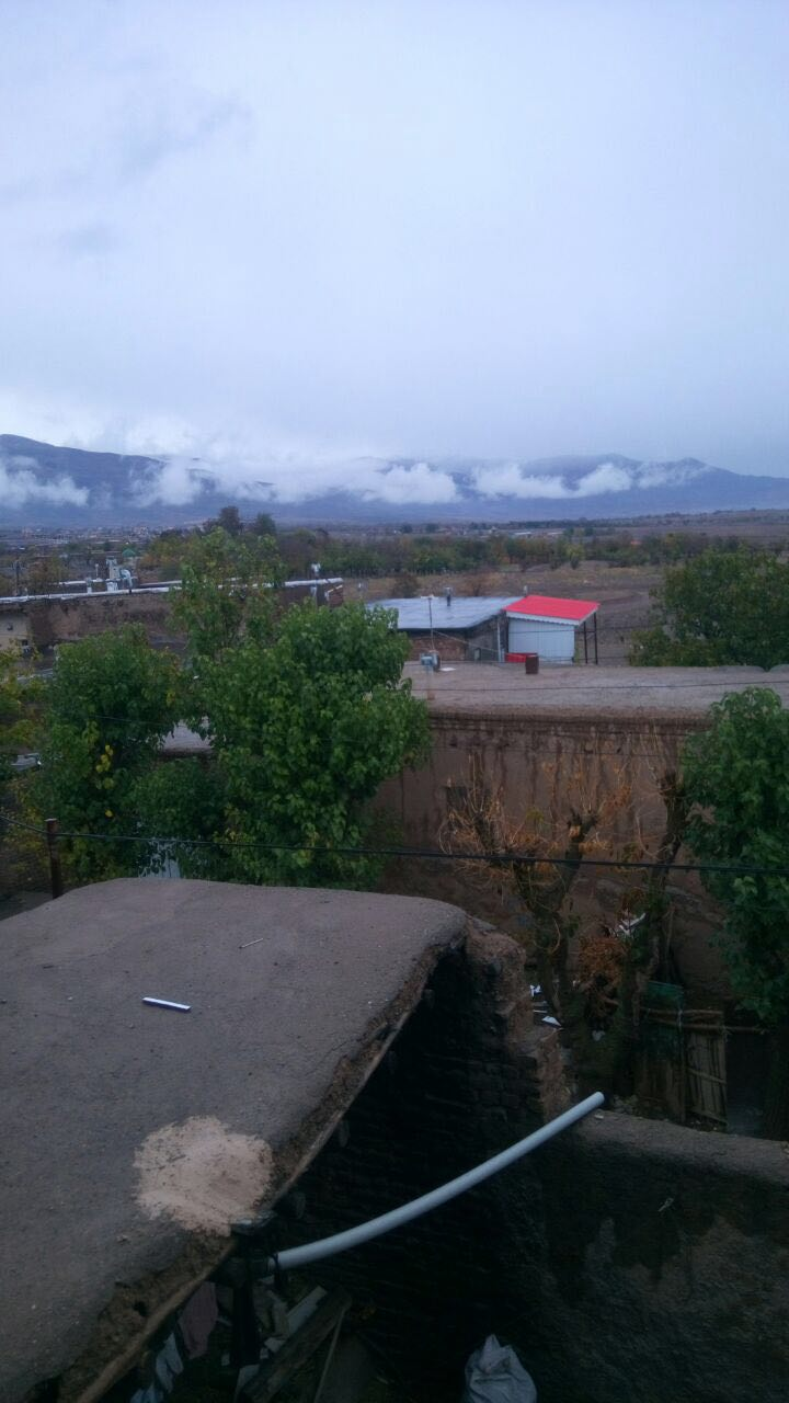 منظره ۵